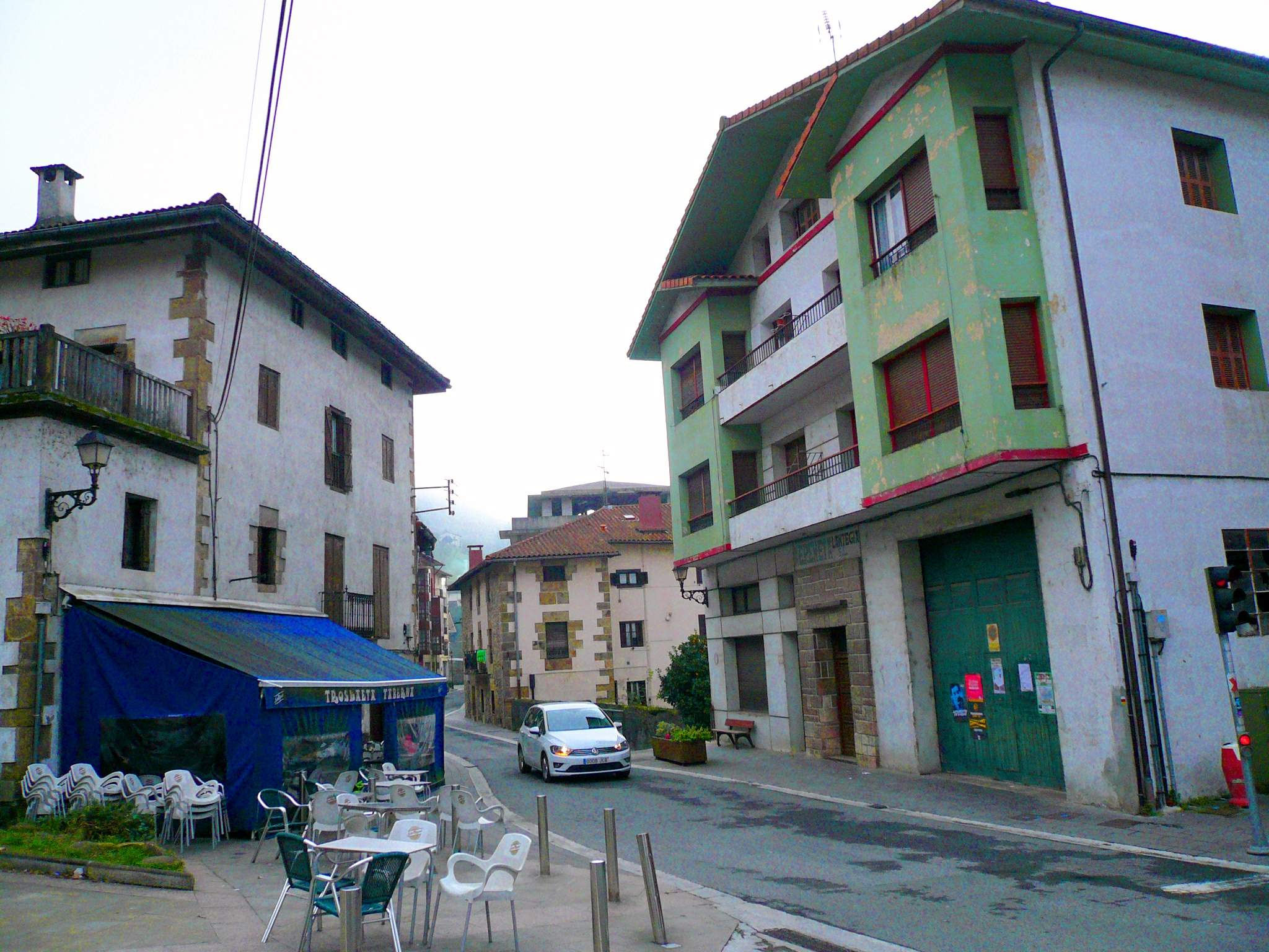 Barrio de San Martín, Ataun (Guipúzcoa)